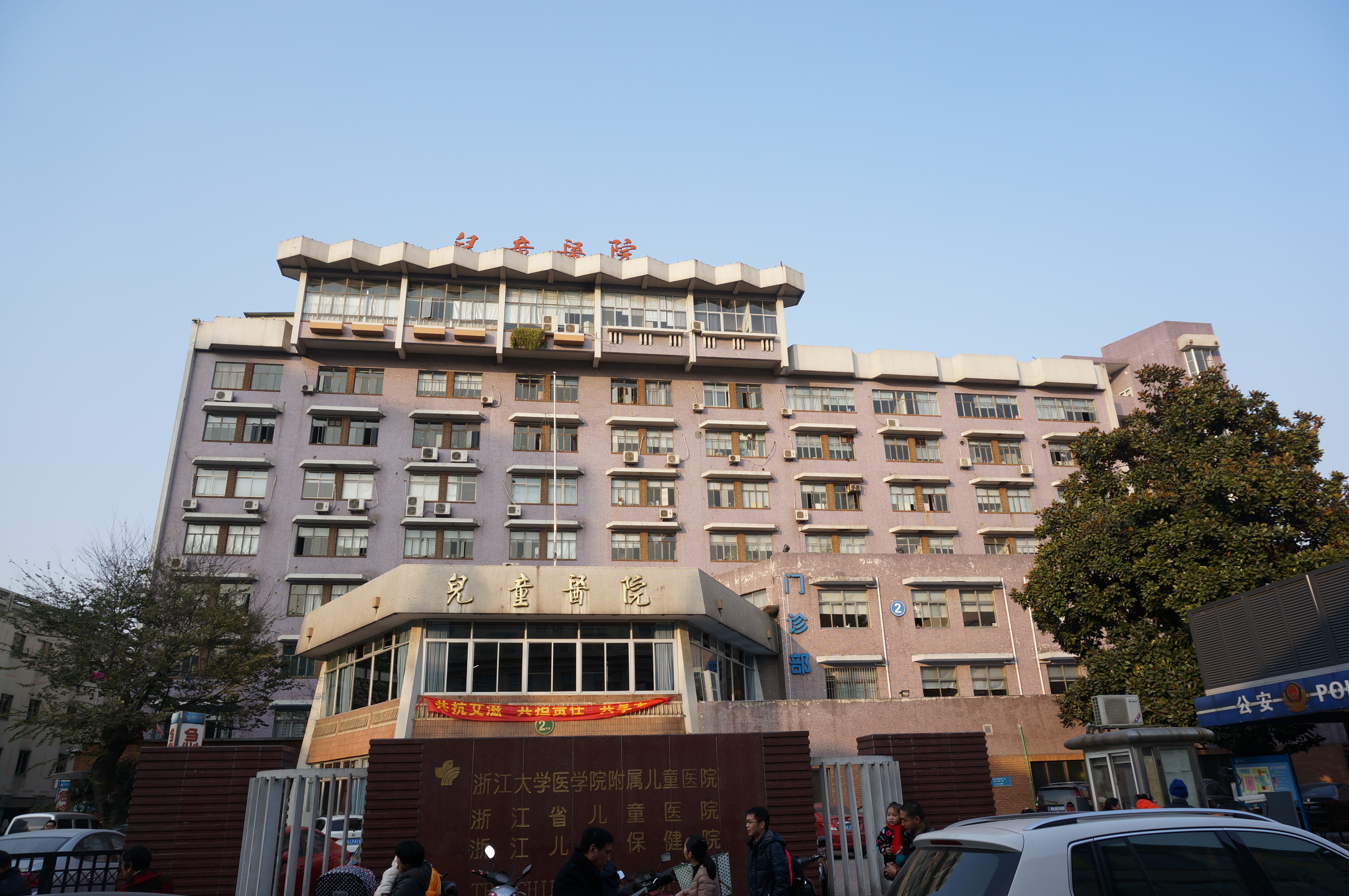 浙江大学医学院附属儿童医院（浙江省儿童医院、浙江省儿童保健院），门诊部大楼。